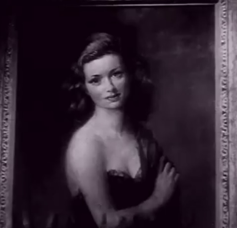 1944年製作の映画「飾窓の女」の予告編より。油絵の肖像画